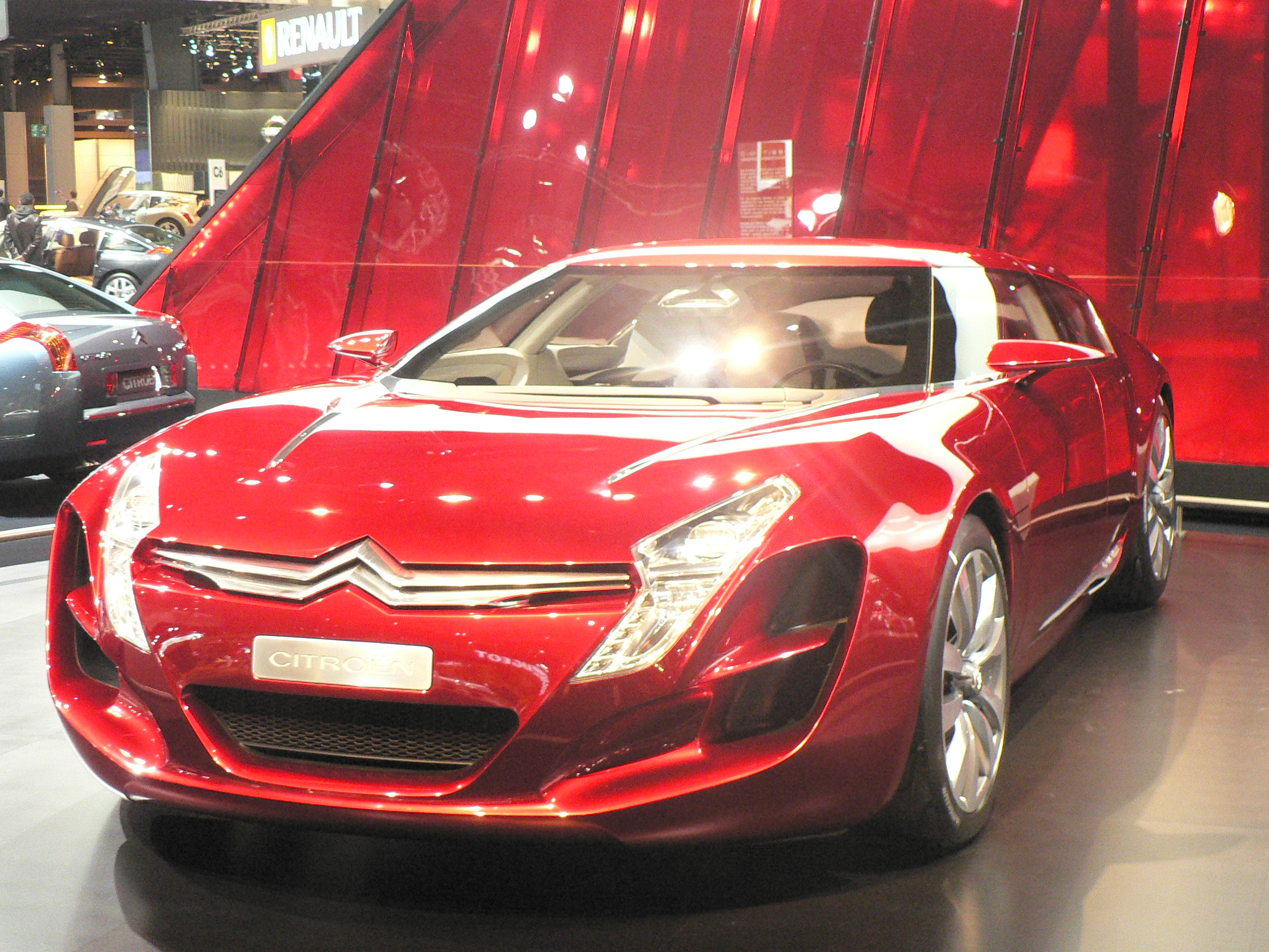 Mondial de l automobile de Paris (October 2006)